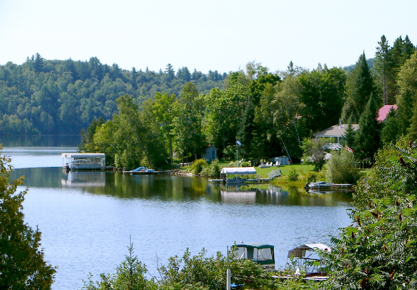 Escalier Reservoir in Bowman, Quebec, Canada